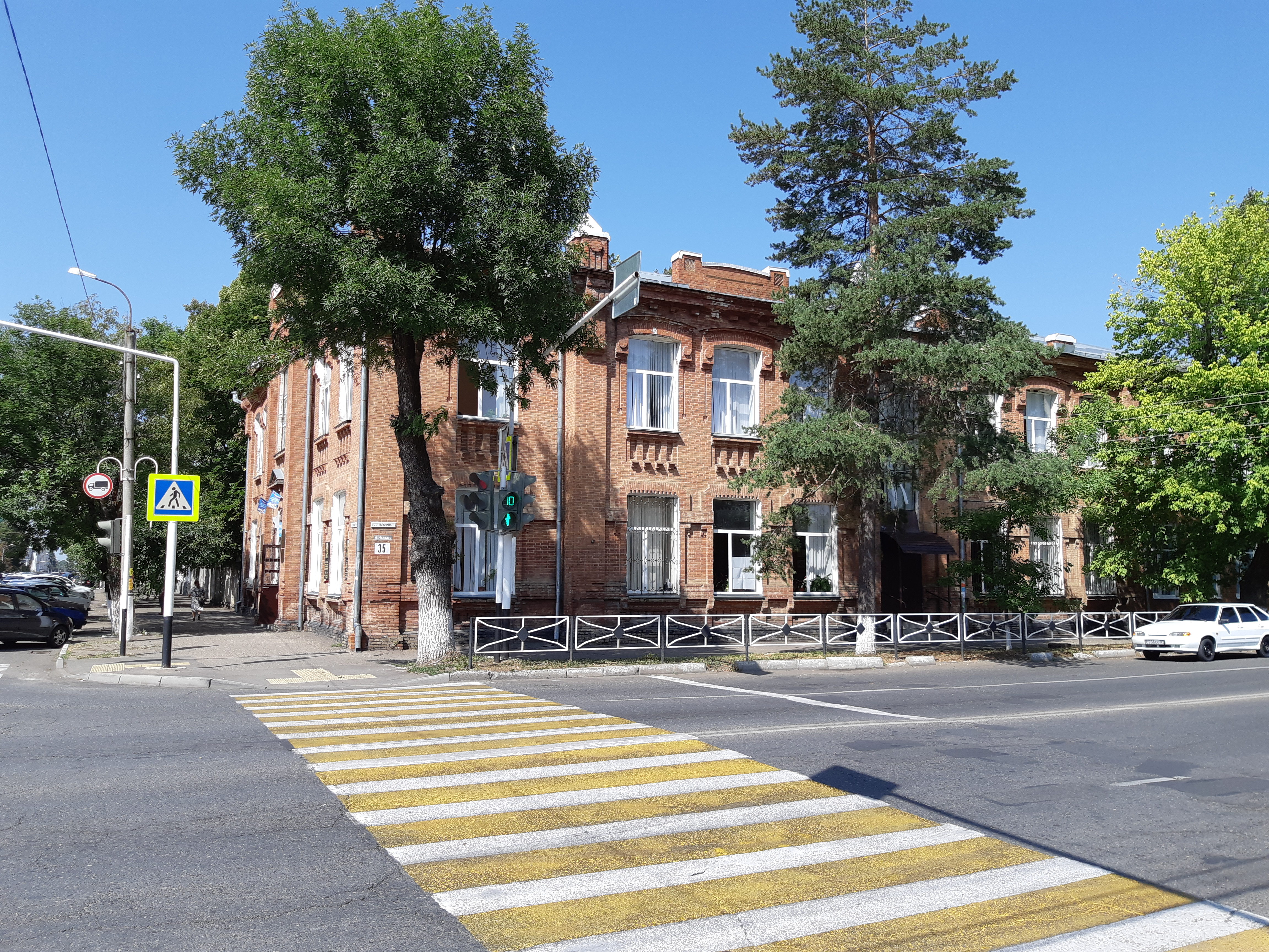 Здание, где в училище учился герой Советского союза Х.Б. Андрухаев: улица Советская, 160, Майкоп, Адыгея